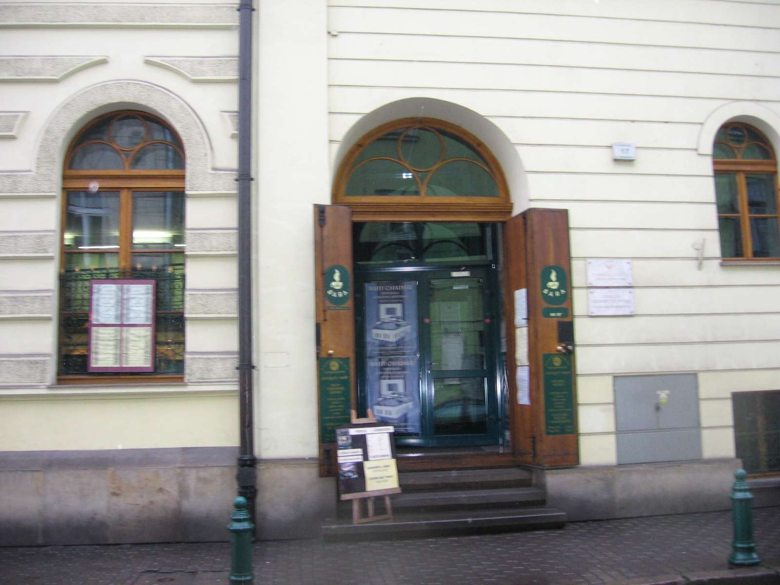 Synagoga Bne Emuna w Krakowie Author: Wikipedysta:Birczanin